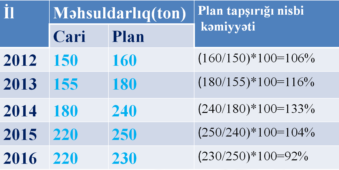 Plan tapşırığı nisbi kəmiyyəti